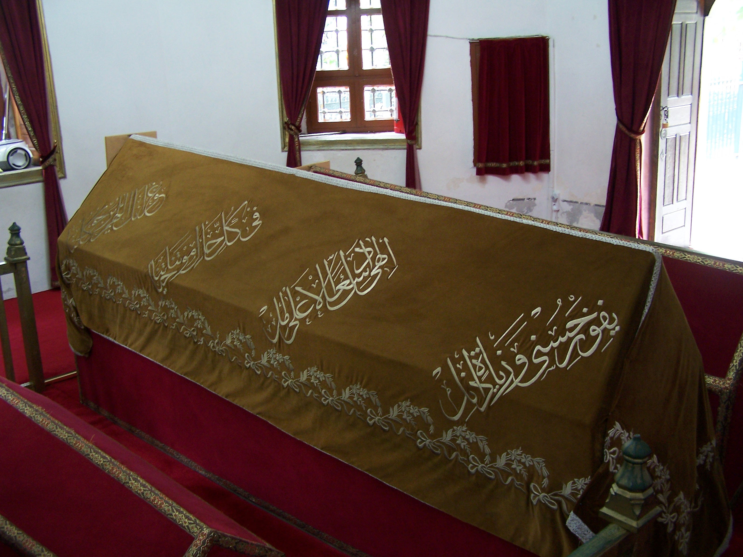 Gülbahar Hatun Türbesi at Fatih Camii in Fatih, İstanbul, Turkey